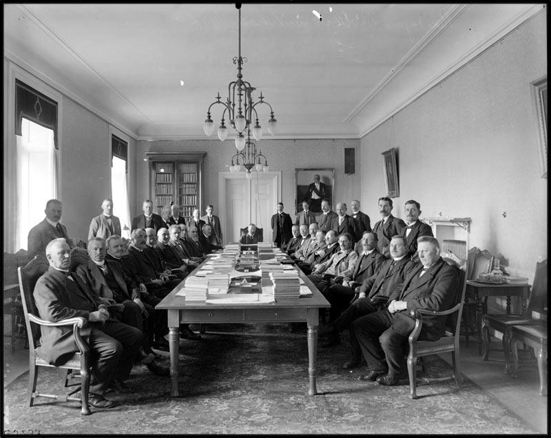 Riksdagens bevillningsutskott sammanträder.